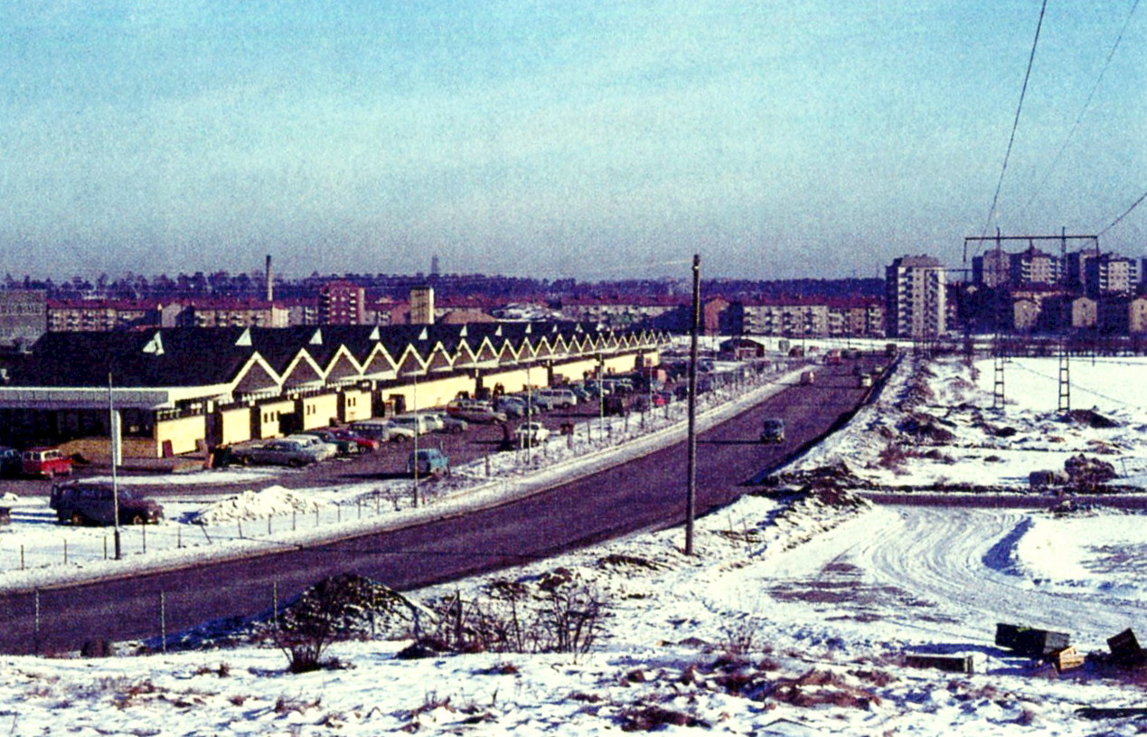 Trädgårdshallens fasad mot Åbyvägen